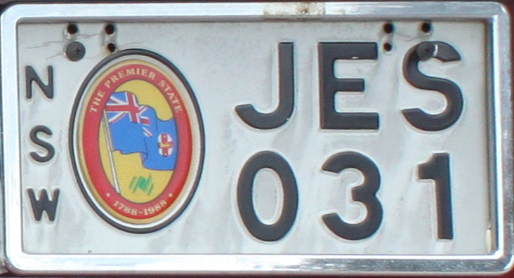 Daewoo Cielo GLX